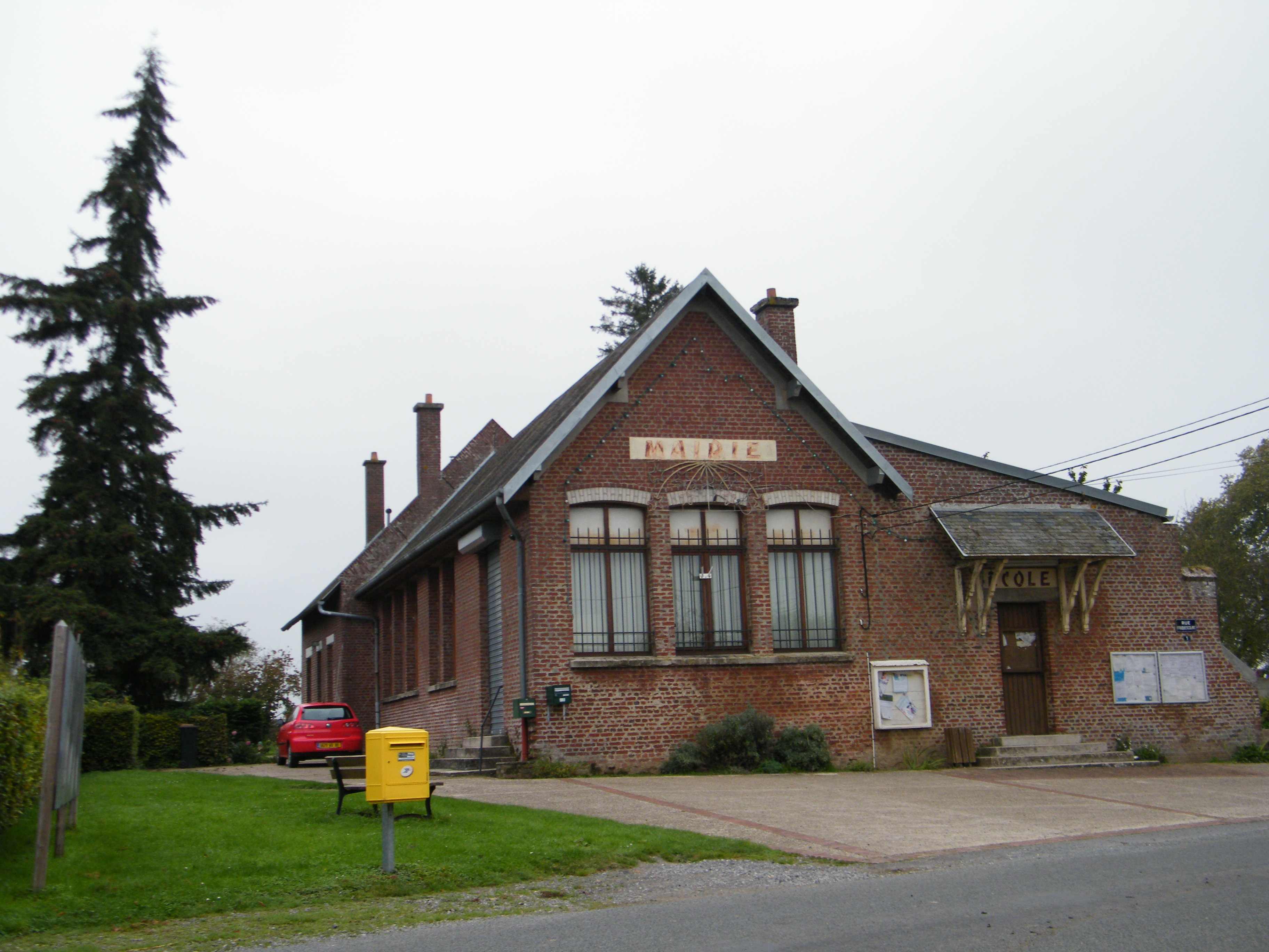 Bâtiments communaux.